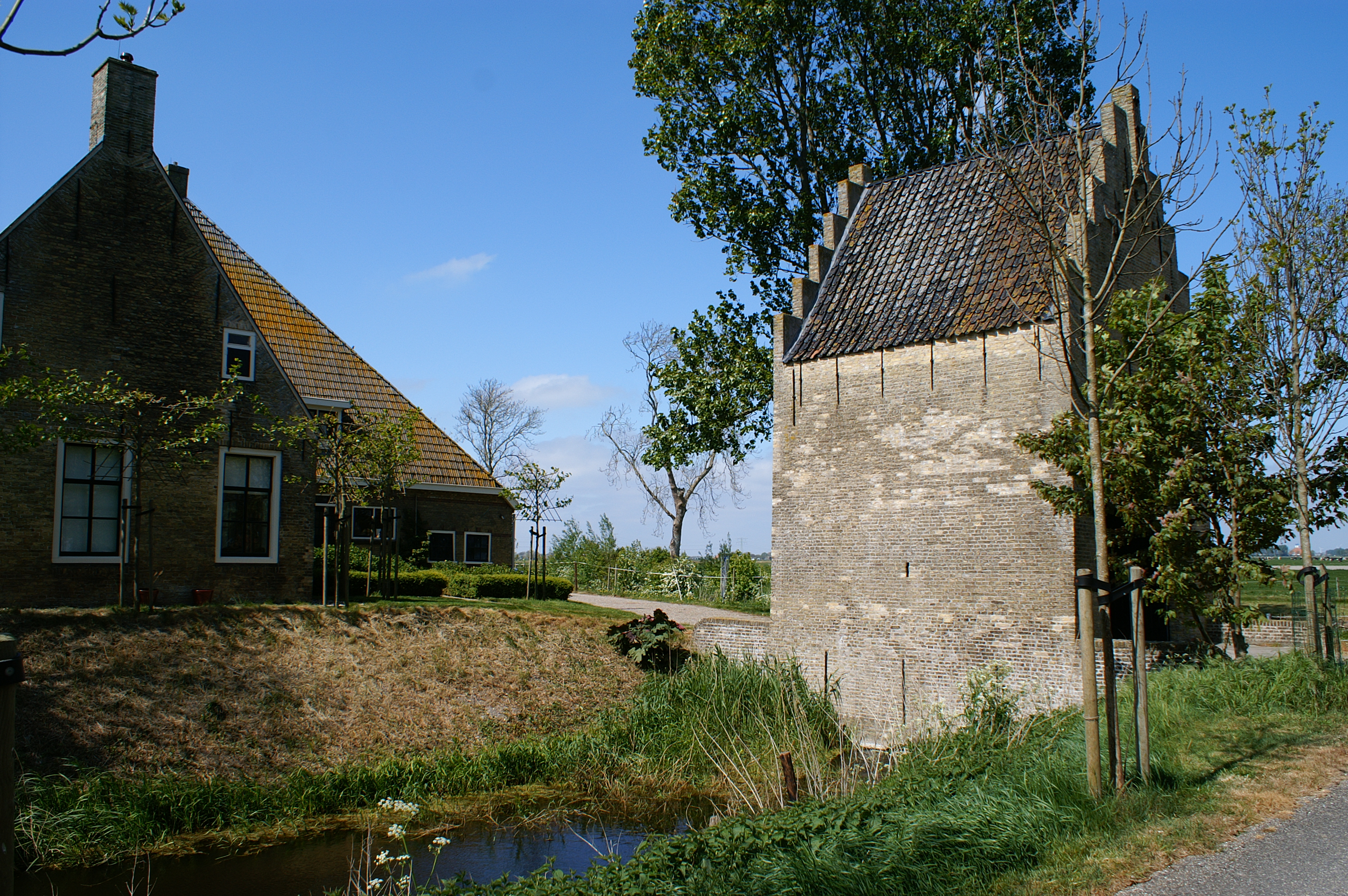 Stinspoort van het verdwenen slot Groot Deersum met de huidige boerderij.